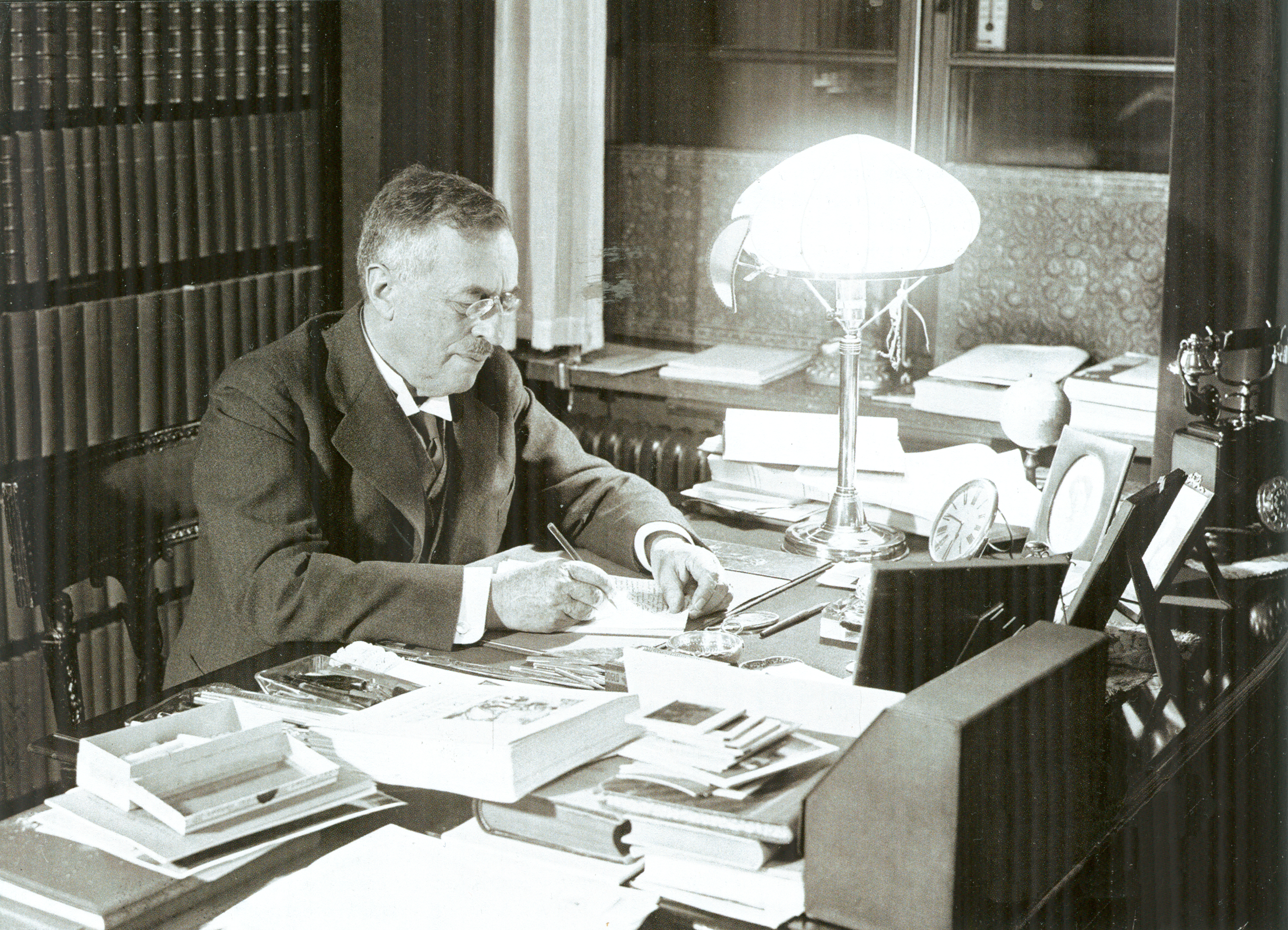 Sven Hedin fotograferad i hemmet för ett reportage i veckotidningen Husmodern år 1935, samma år som han kom hem från sin sista expedition.